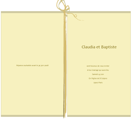 Faire part de pariage